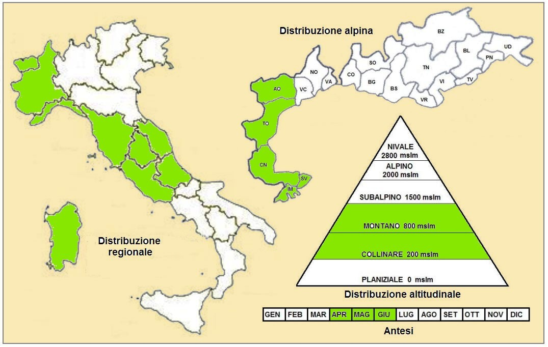 Ranunculus gramineus - Distribuzione